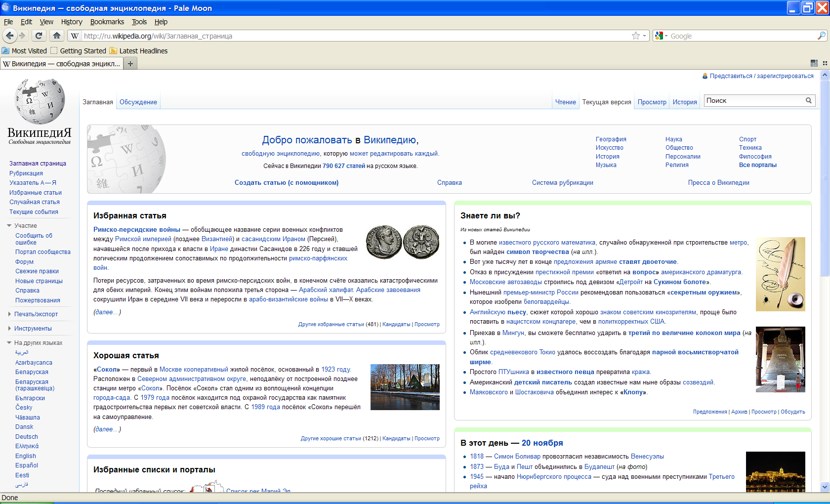 Скриншот программы Pale Moon 8 в Windows XP